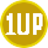 Classico "1-up" che dona 1 vita extra, in forma di moneta